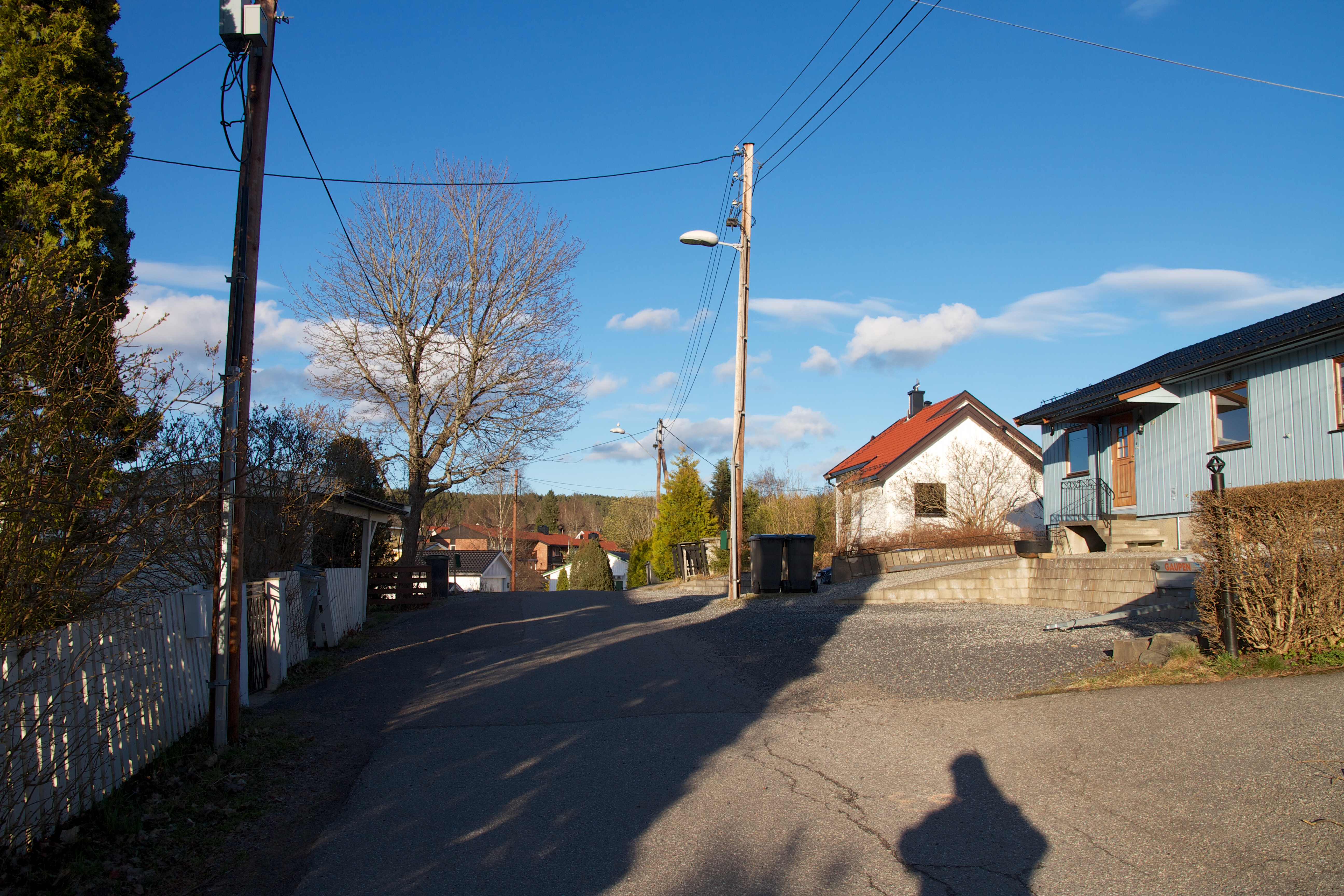 Tores vei på Ulsrud i Oslo.